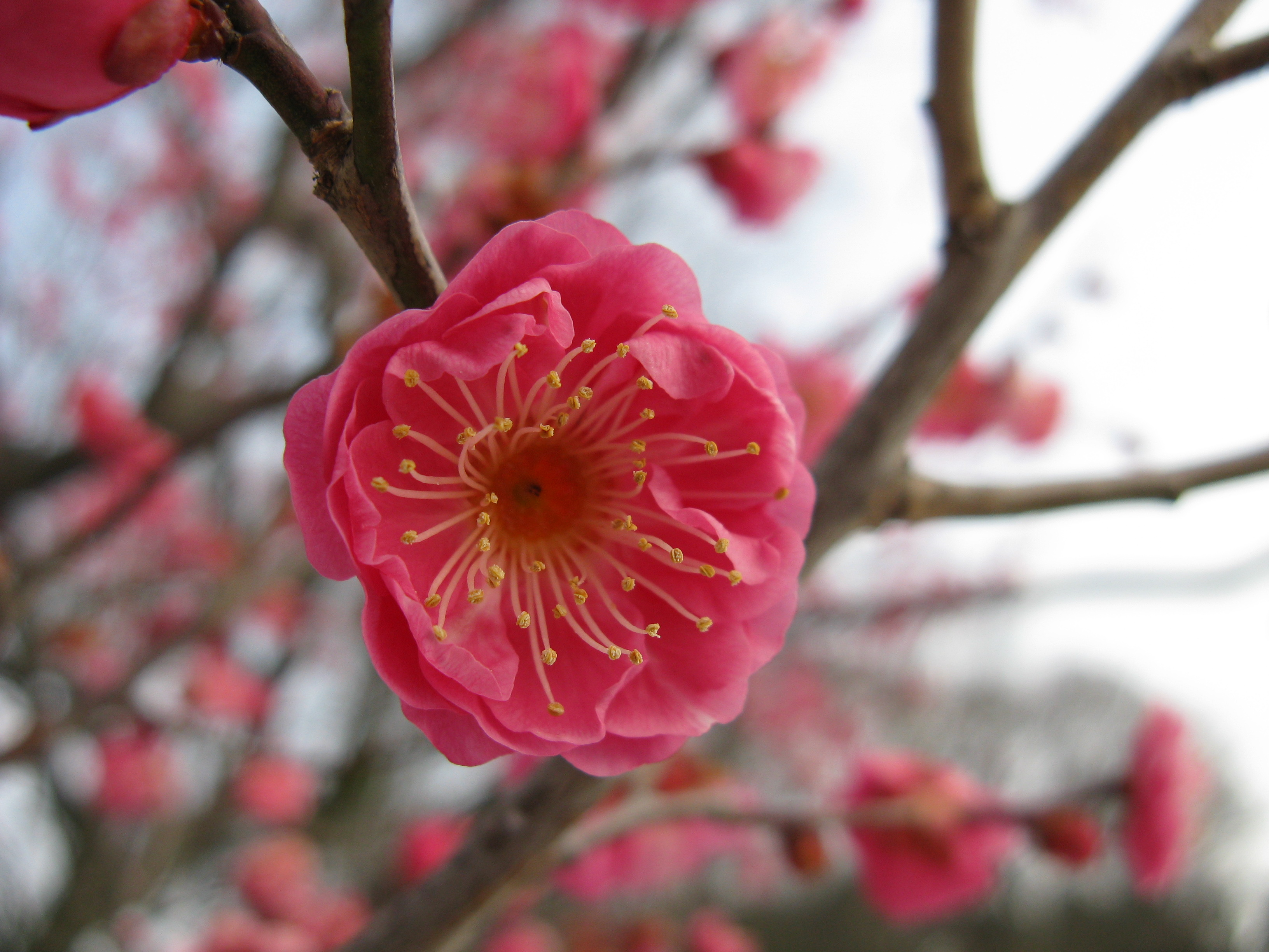 Prunus mume 'Yaetobai'